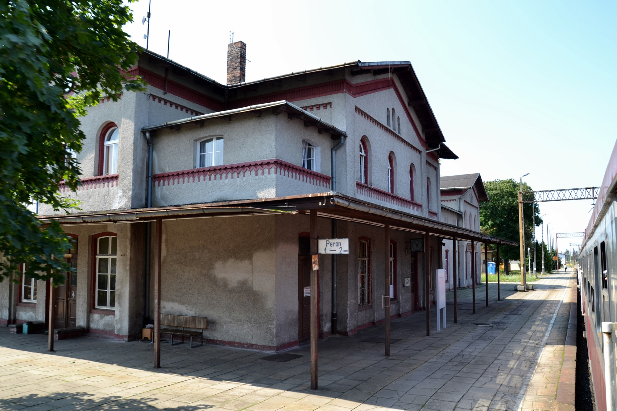 Widok stacji w Czerwieńsku od strony peronów